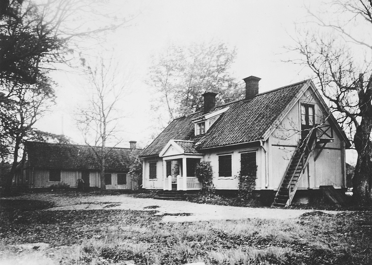 Hökarängens gård, boningshuset från sydväst